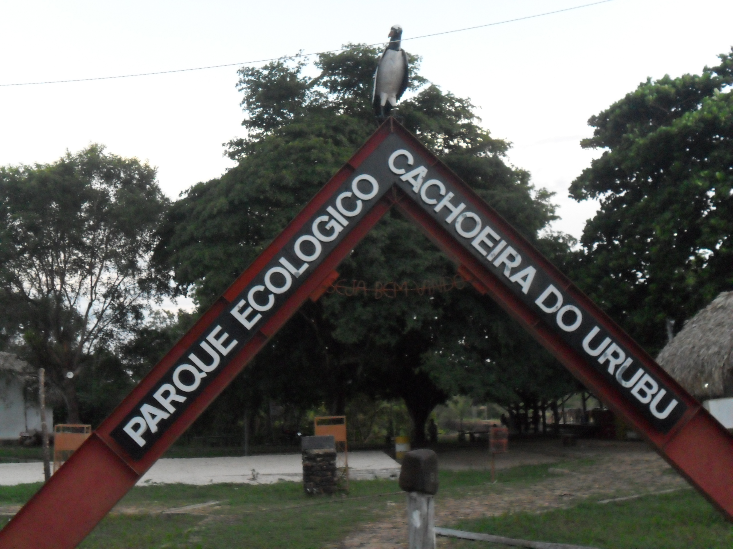 vista da cachoeira do urubu a partir do território de Esperantina-PI